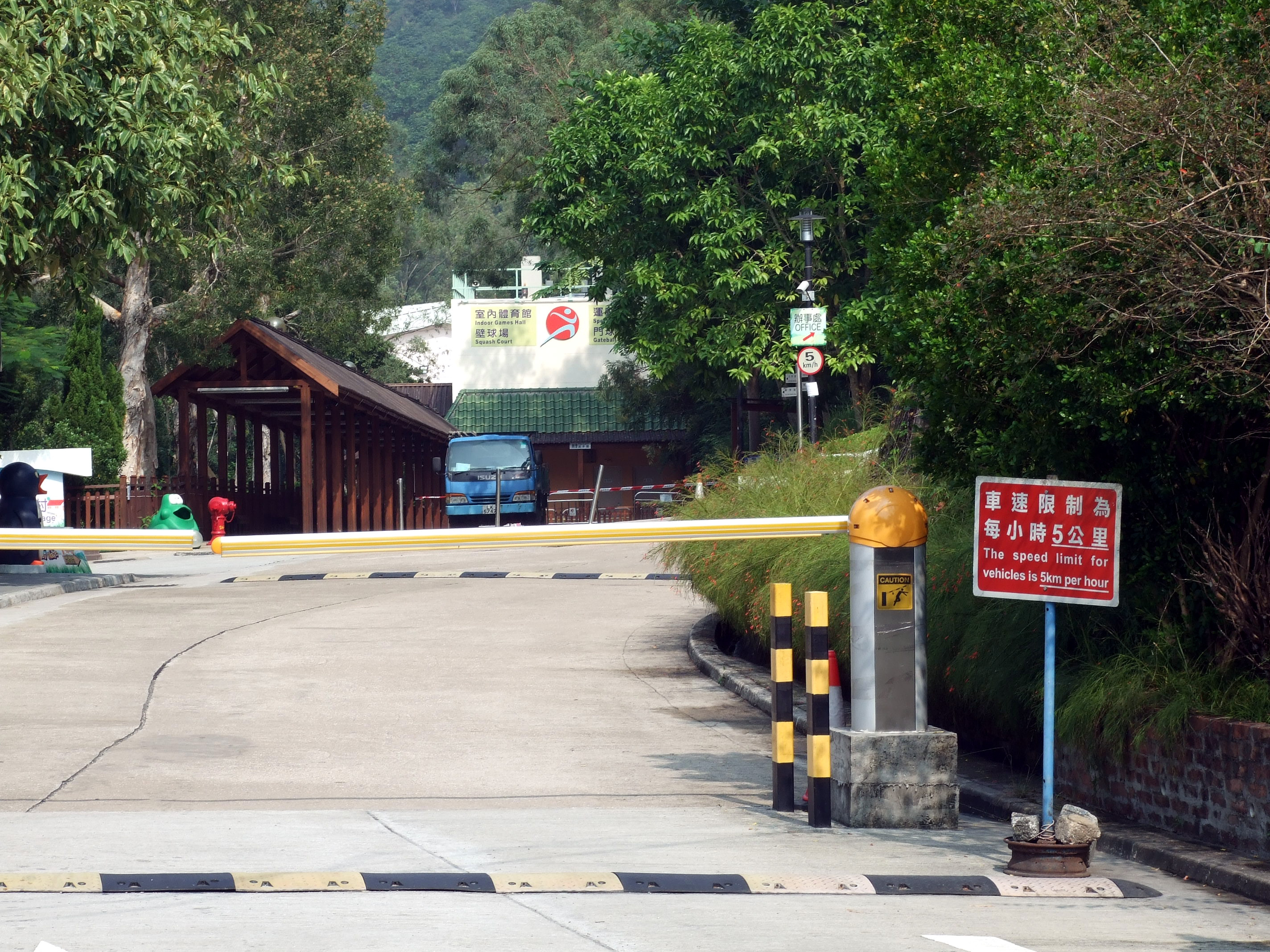 中文（香港）: 麥理浩夫人度假村入口